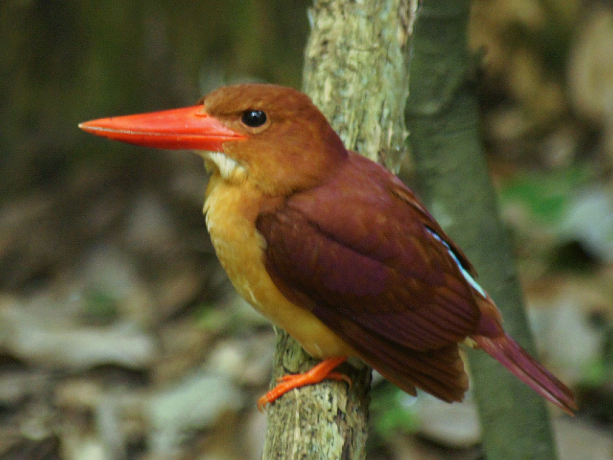 アカショウビン